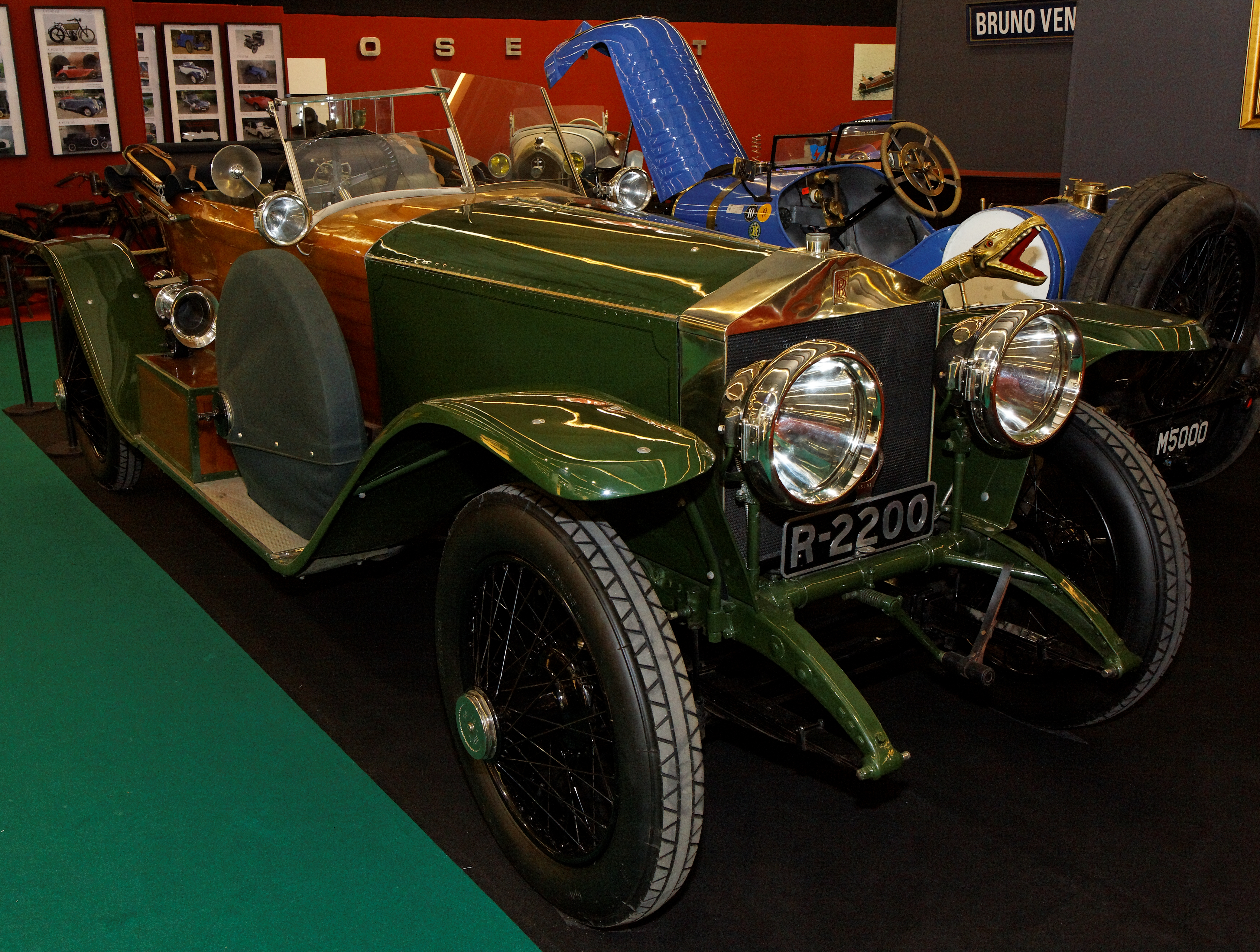 Photographie prise lors du salon rétromobile 2011 à Paris, porte de Versailles.